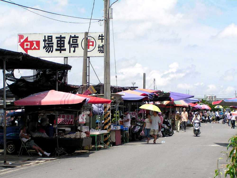 臺南善化牛墟。